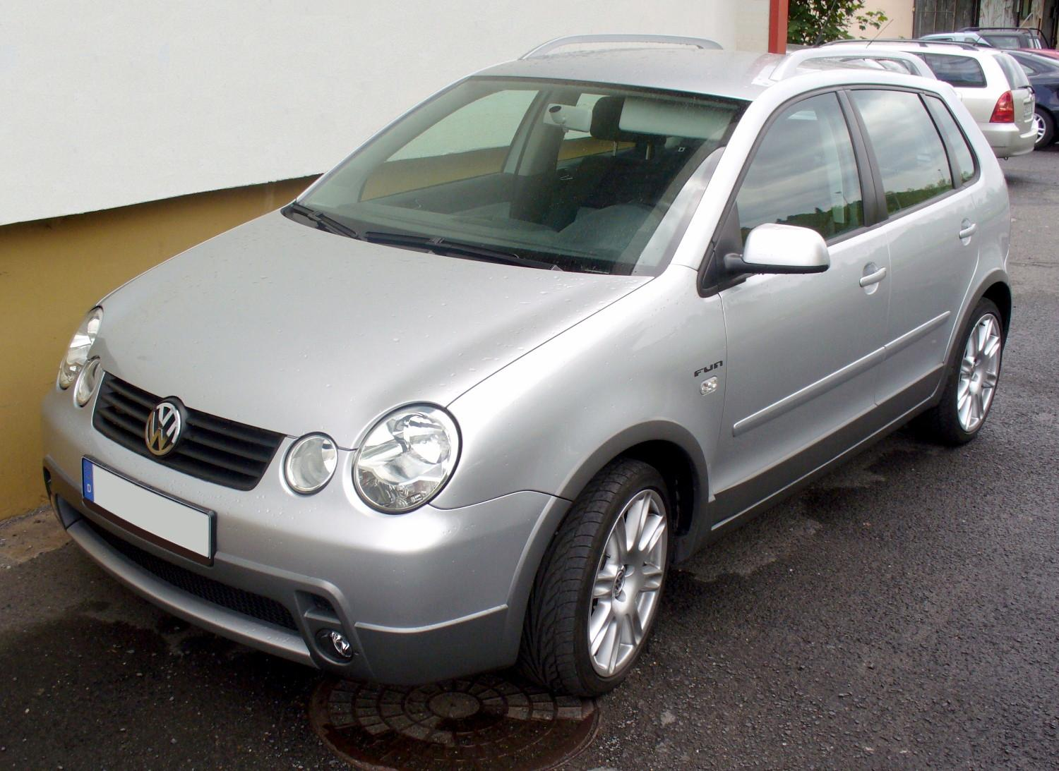 VW Polo Fun